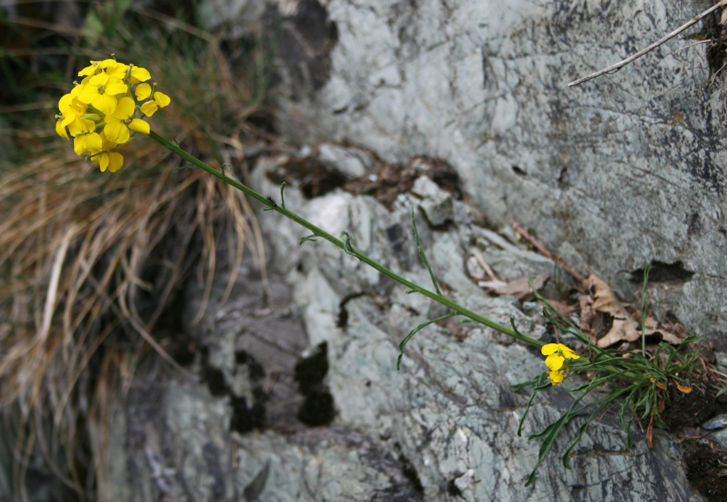 Erysimum pseudorhaeticum, Kreuzblütler (Brassicaceae) - Italien/Italia/Italy: Toscana, Prov. Lucca, Parco Regionale delle Alpi Apuane, an der Straße zwischen Orto di Donna und Gramolazzo